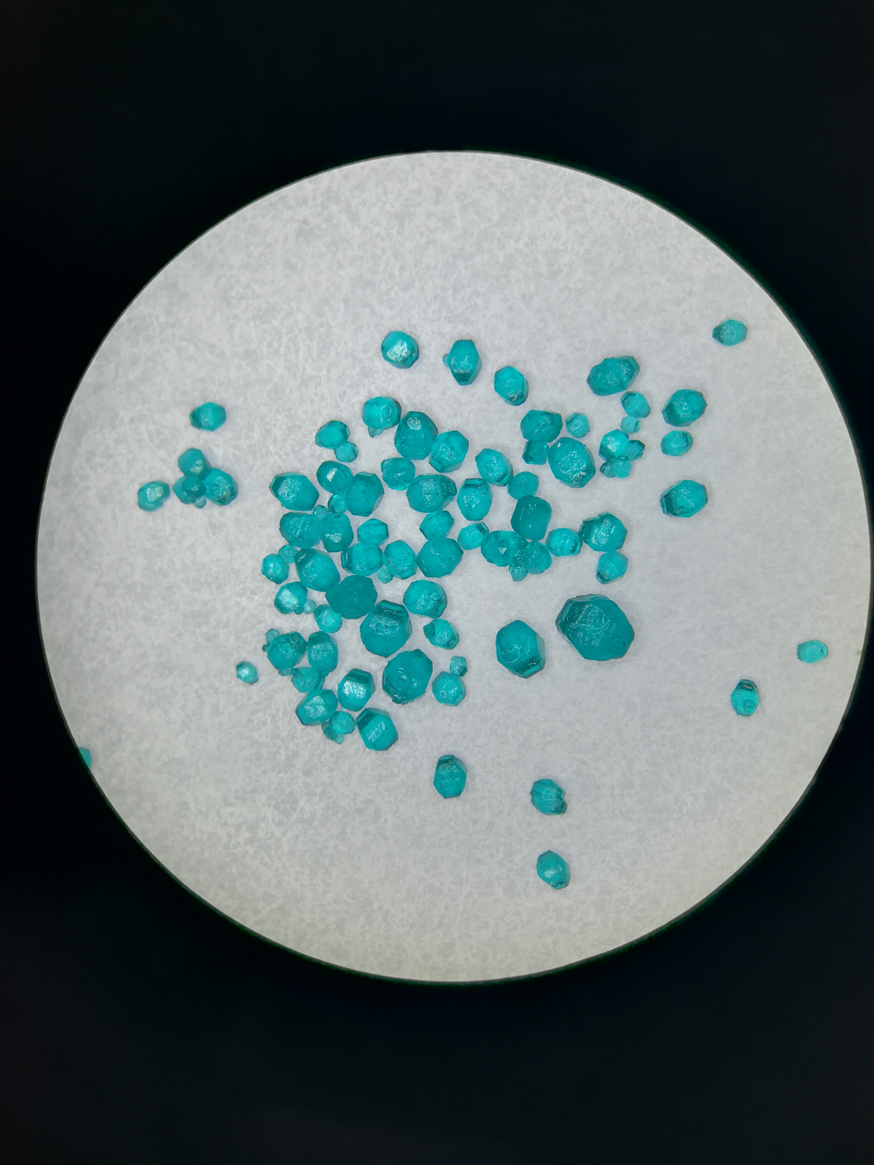 中文（中国大陆）: 显微镜下的硫酸镍六水合物